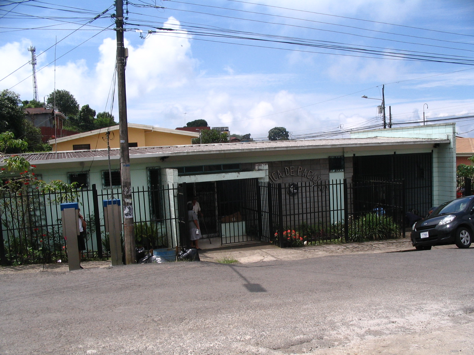 Clínica de Salud de Pacayas